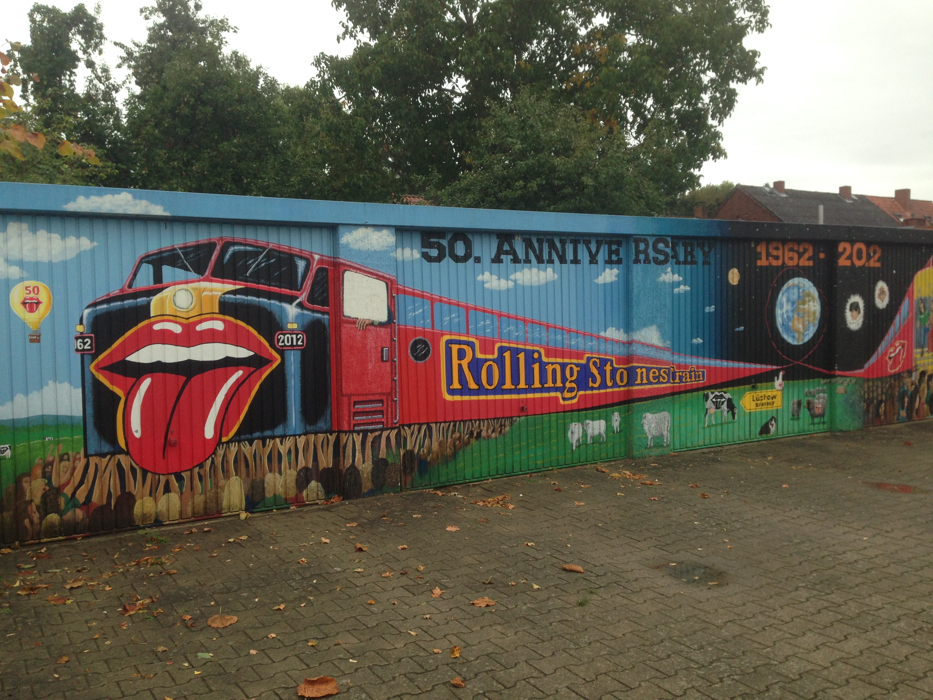 Gartenstraße, Lüchow, Rolling Stones Wall